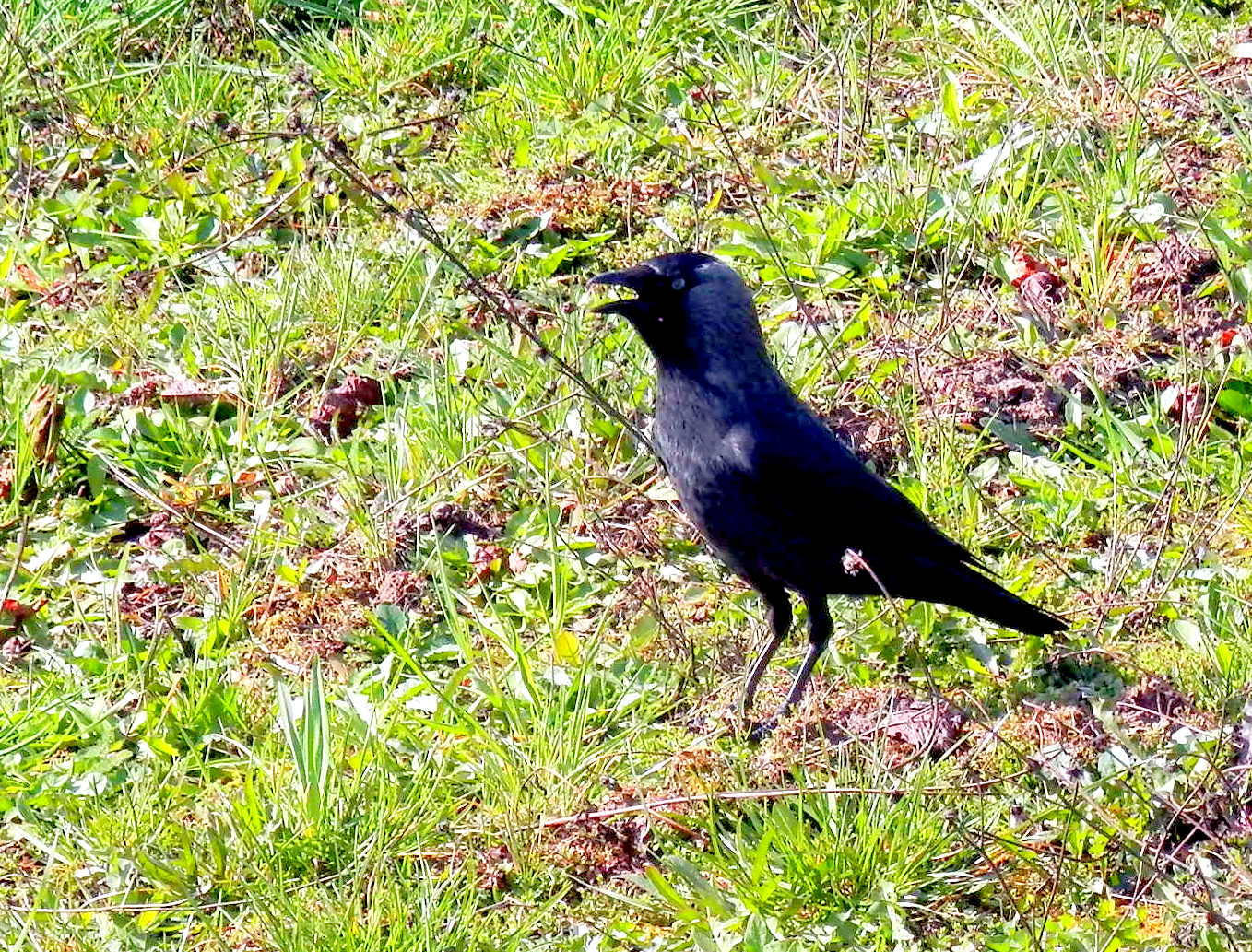 Vrana čierna (iné názvy: vrana obyčajná, vrana túlavá lat. Coloeus monedula. Solivarská ulica, mesto Prešov.